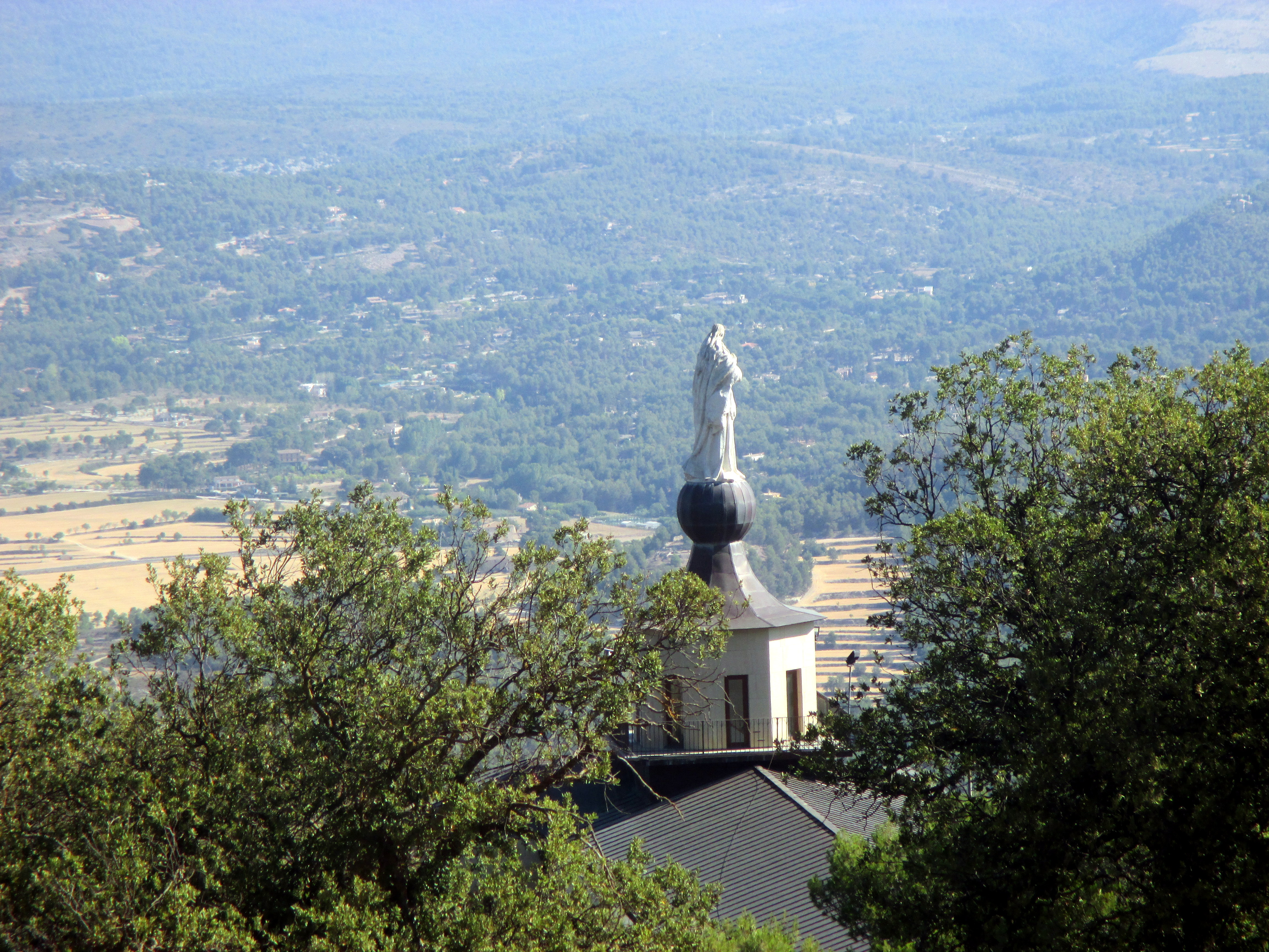 Bajando desde "El menejador" por la senda. Vista del Santuario This is a photography of a Special Area of Conservation in Spain with the ID: ES0000213. Natura2000 entry, EEA entry